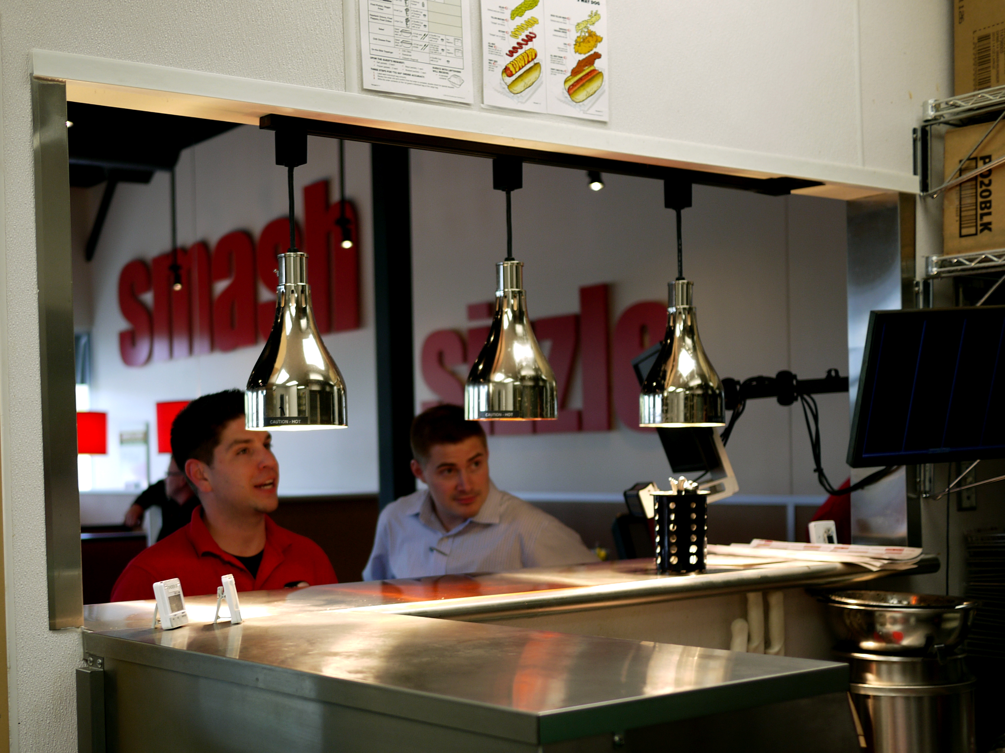 Smashburger